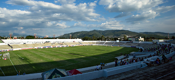 El "Coloso de Ixcotel"